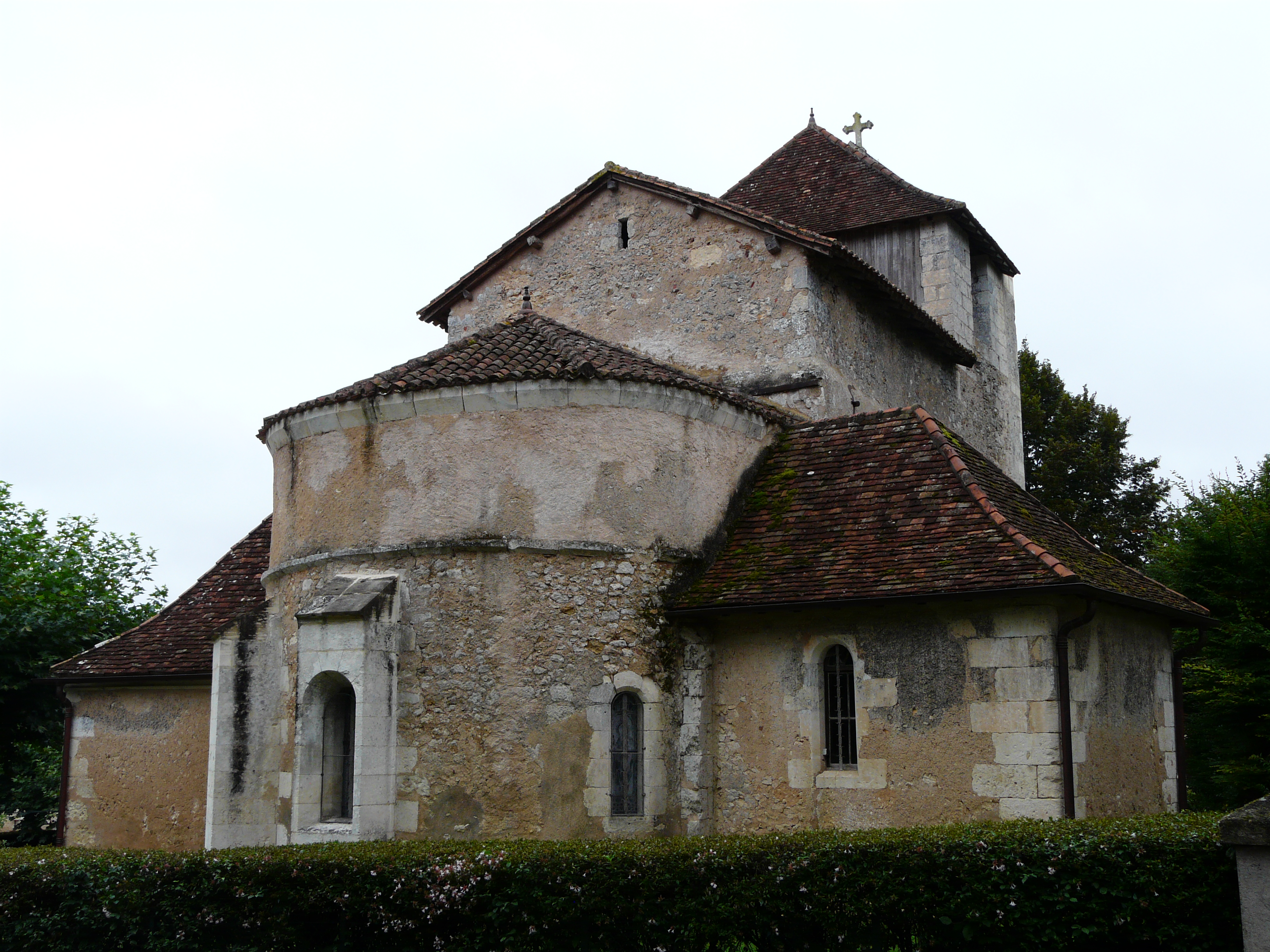 L'église Saint-Hilaire de Saint-Hilaire-d'Estissac, Dordogne, France.